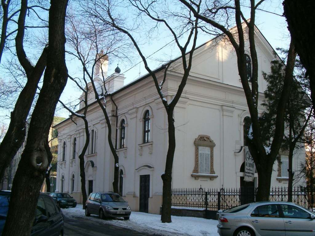 Szeged, régi zsinagóga saját kép, 2005 március